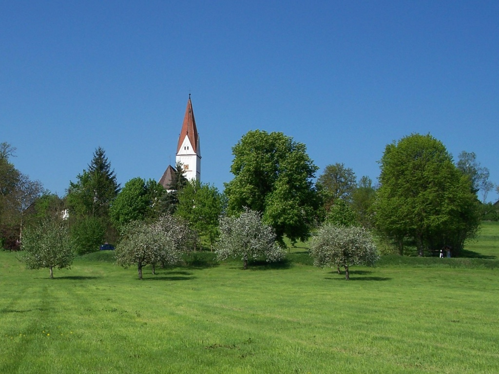 St.-Georgs-Kirche in Holzschwang (Neu-Ulm)